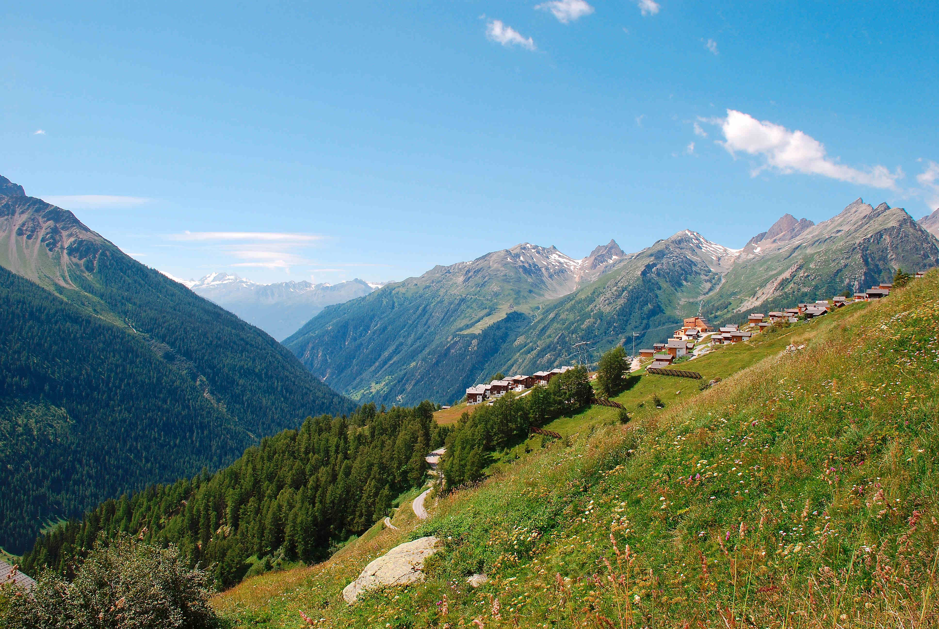 Lauchernalp im Lötschental, Schweiz